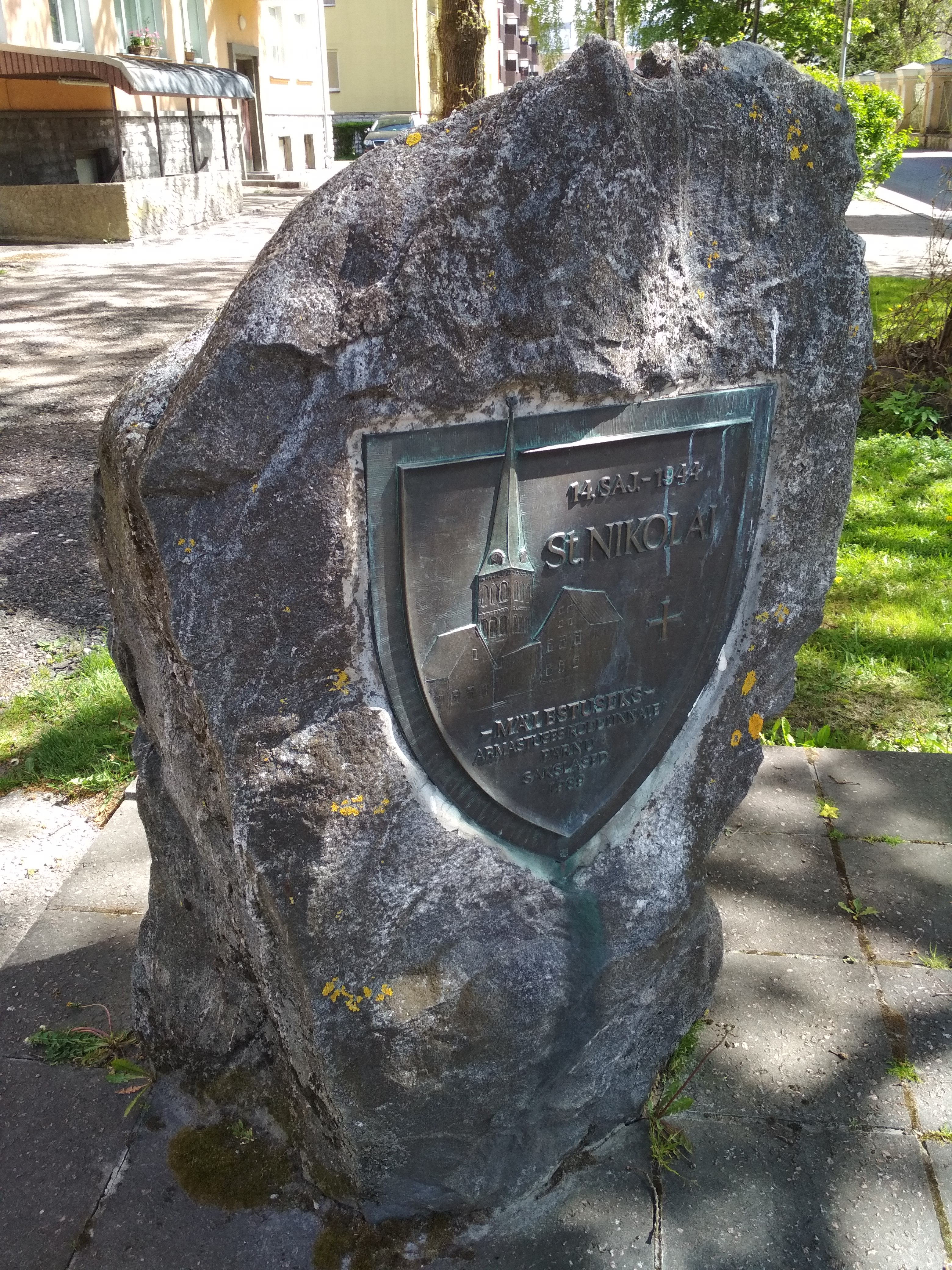 Pärnu Nikolai kirikule pühendatud mälestuskivi